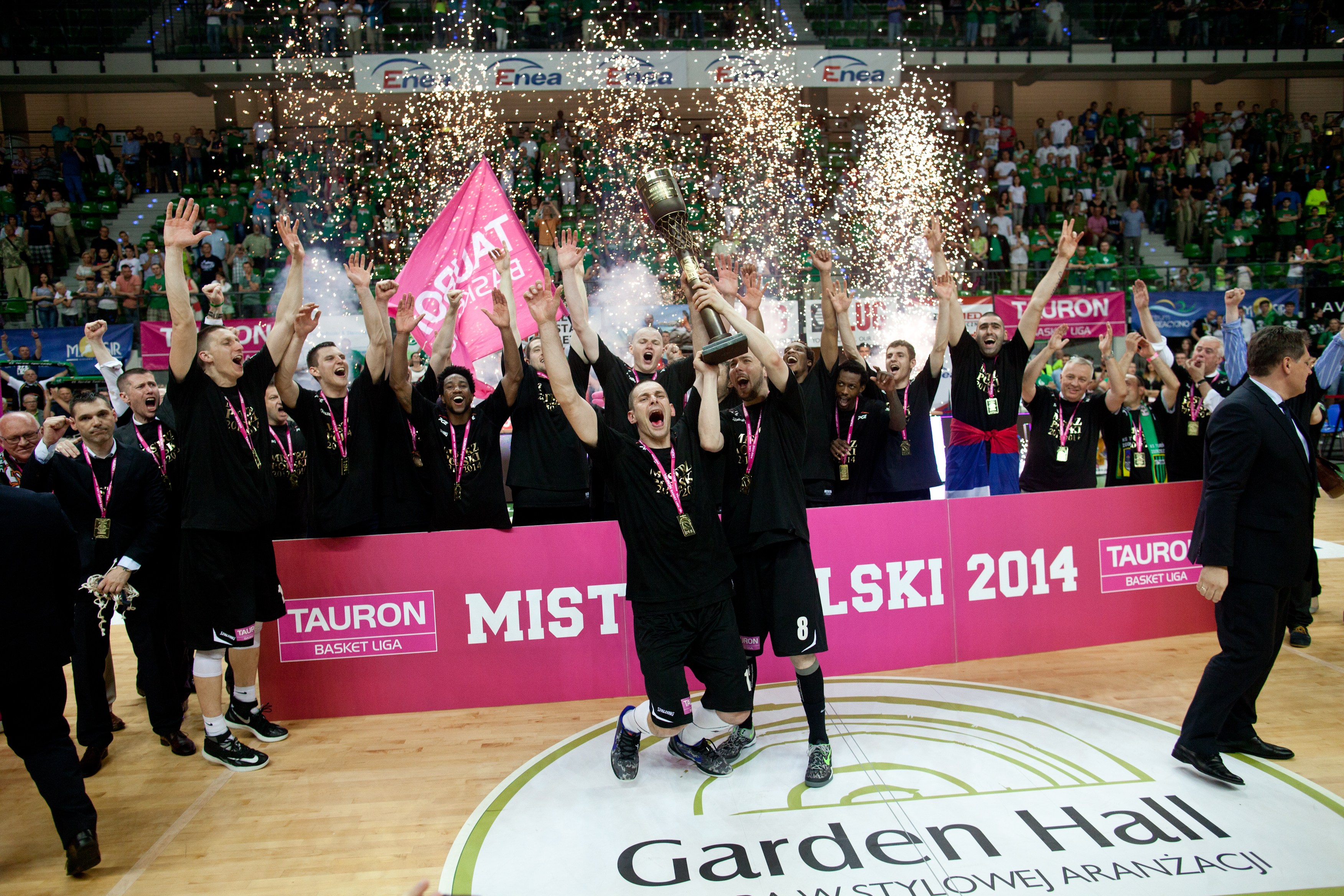 dekoracja PGE Turów Zgorzelec za Mistrzostwo Polski Tauron Basket Ligi